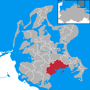 Putbus, Landkreis Rügen, Mecklenburg-Vorpommern